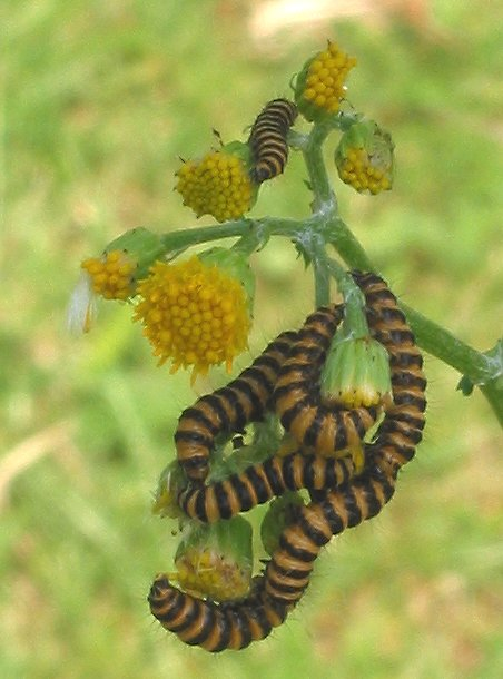 (nl: zebrarupsen op Jacobskruiskruid) Tyria jacobaeae on Jacobaea vulgaris